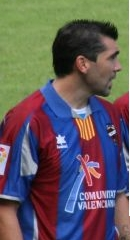 El jugador granota José Serrano Arenas